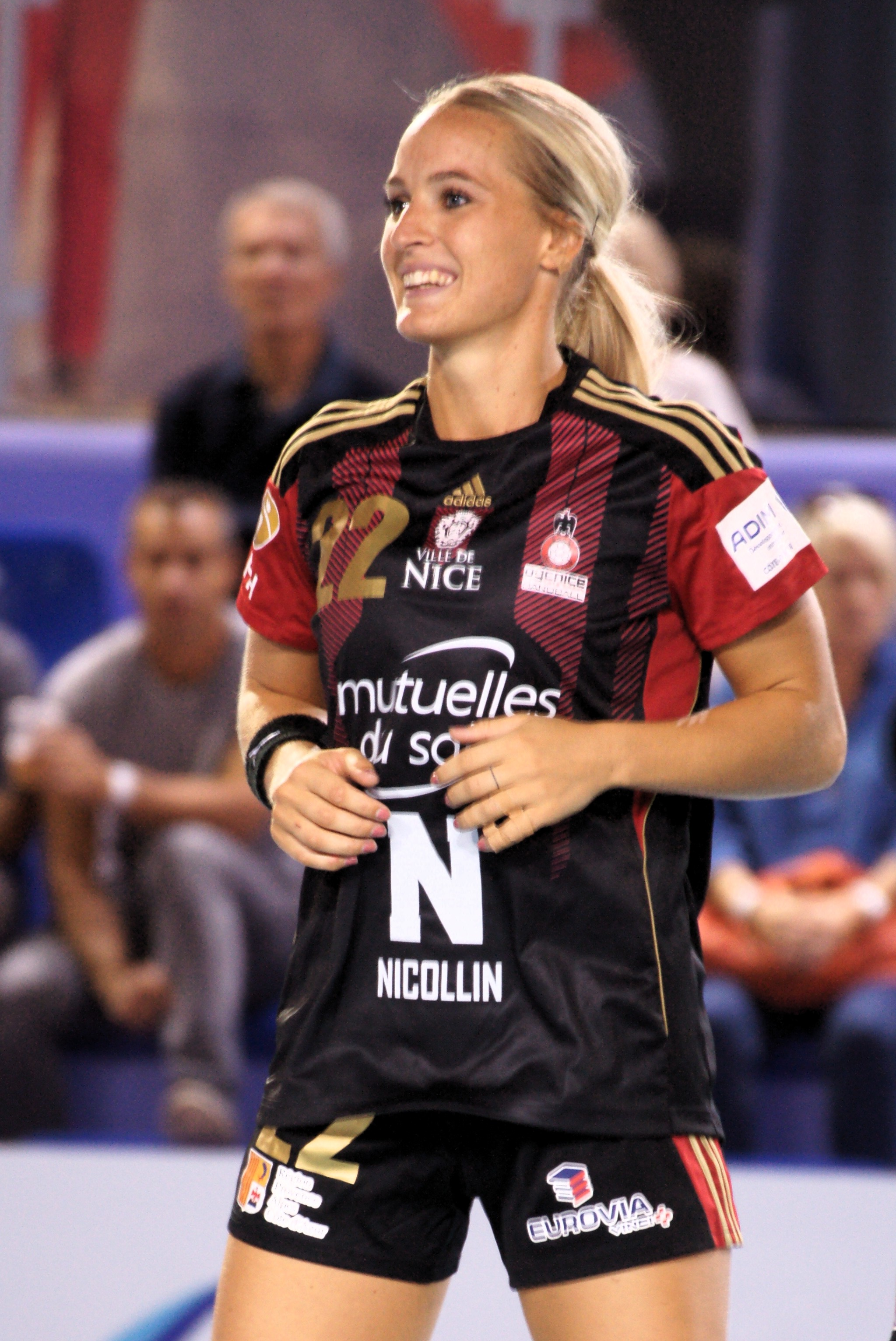 Jane Schumacher, OGC Nice-Fleury 2016